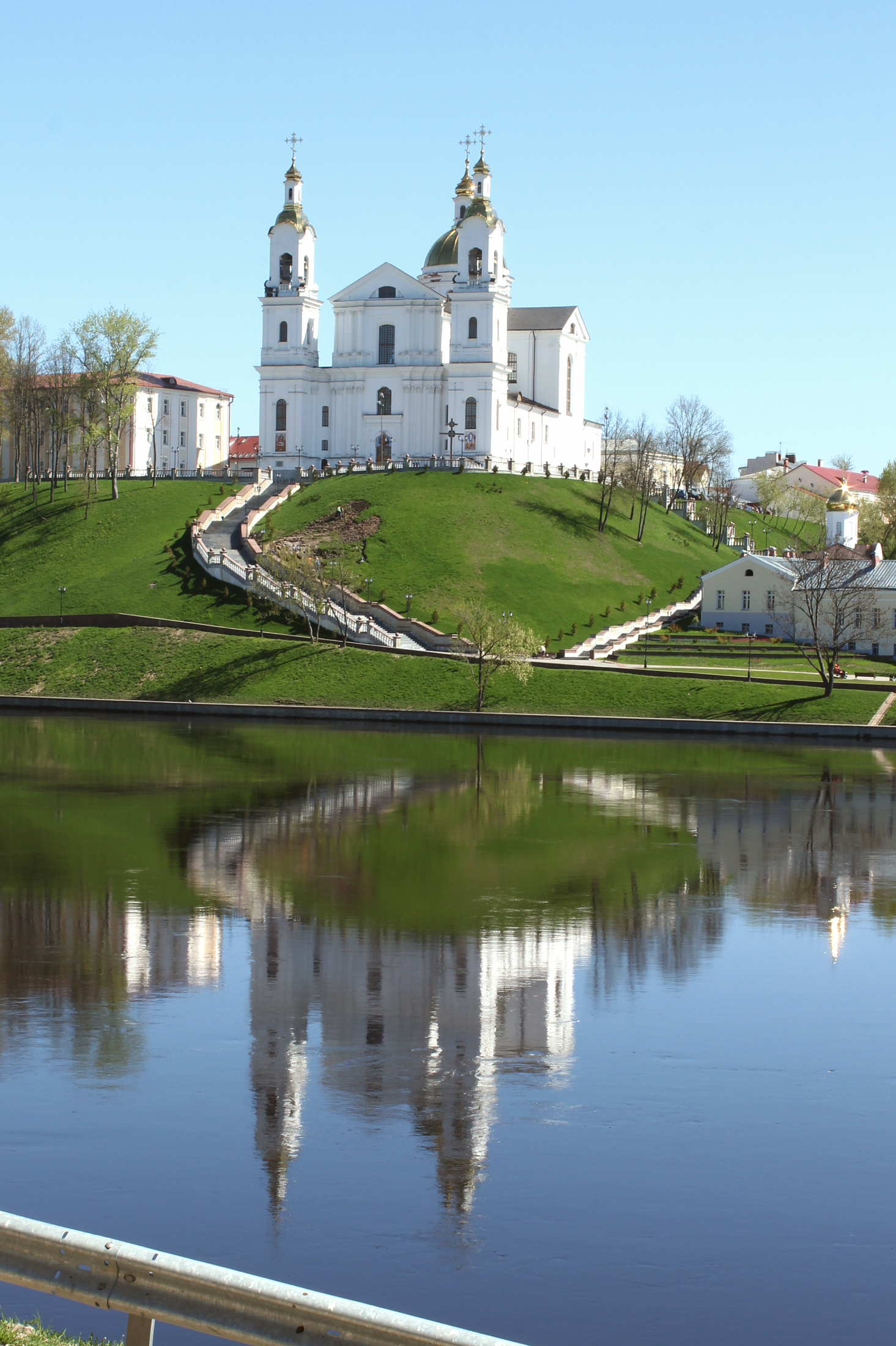 Свято-Успенский кафедральный собор. Успенская горка. Витебск. Вид с правого берега Западной Двины